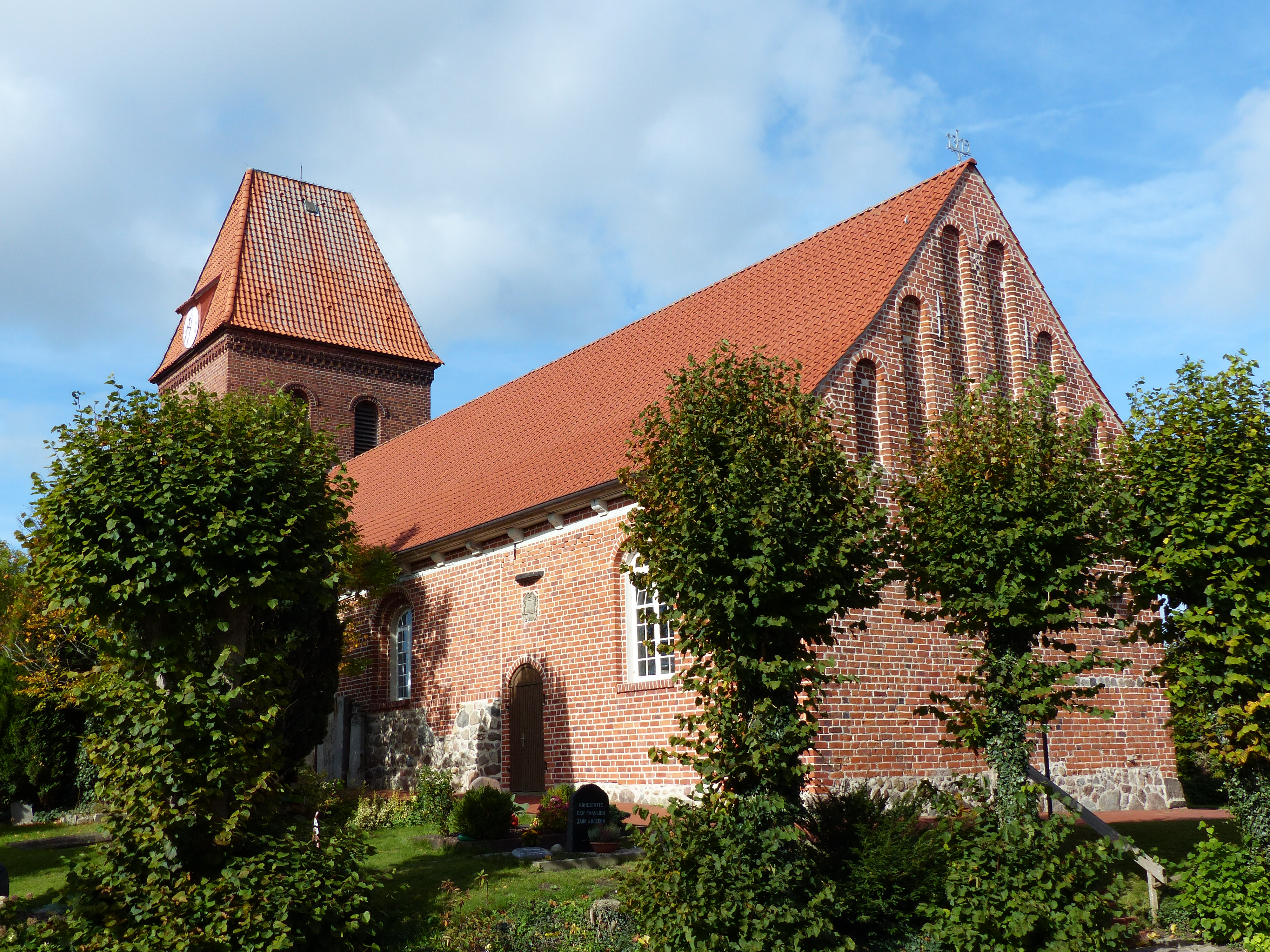 Georgskirche in Spieka von Südosten